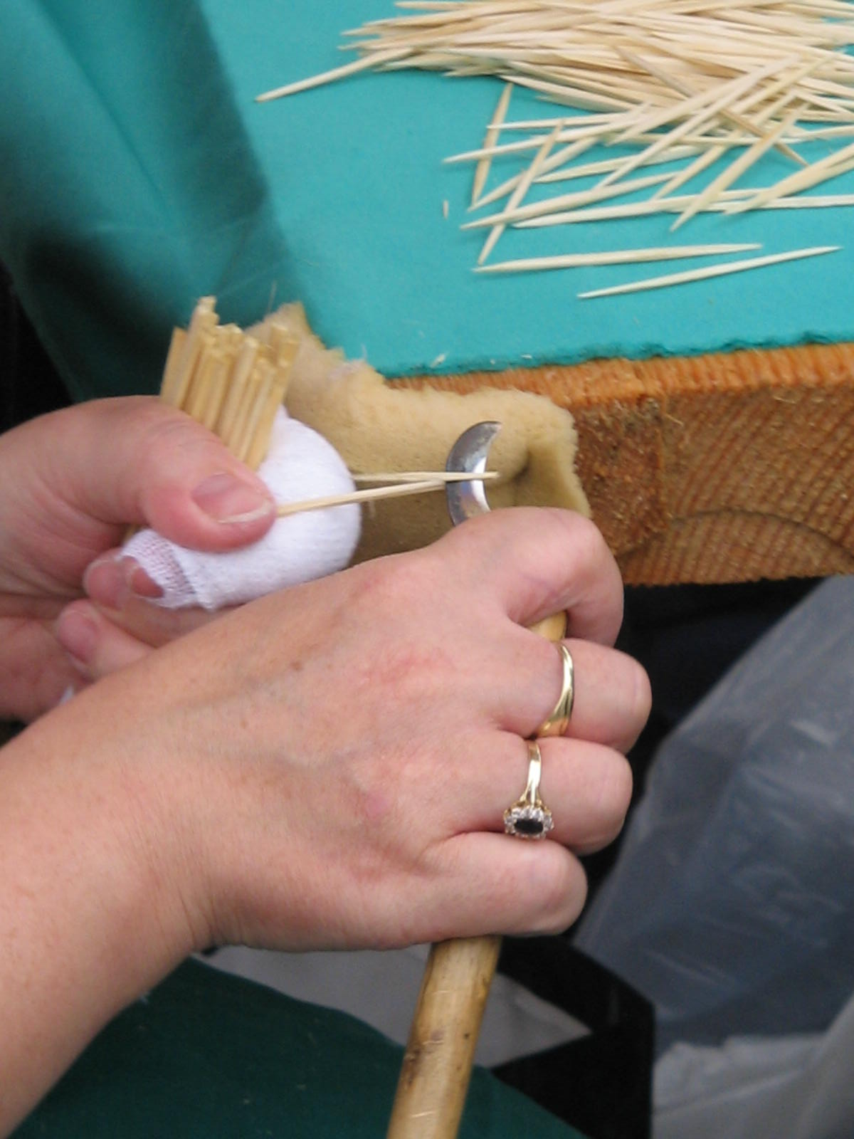 Jahres Market in Ribnica, Slovenija Quelle: eigene Aufnahme 05 Sept. 2005 Fotograf: Janez Novak, Ljubljana, Slovenija